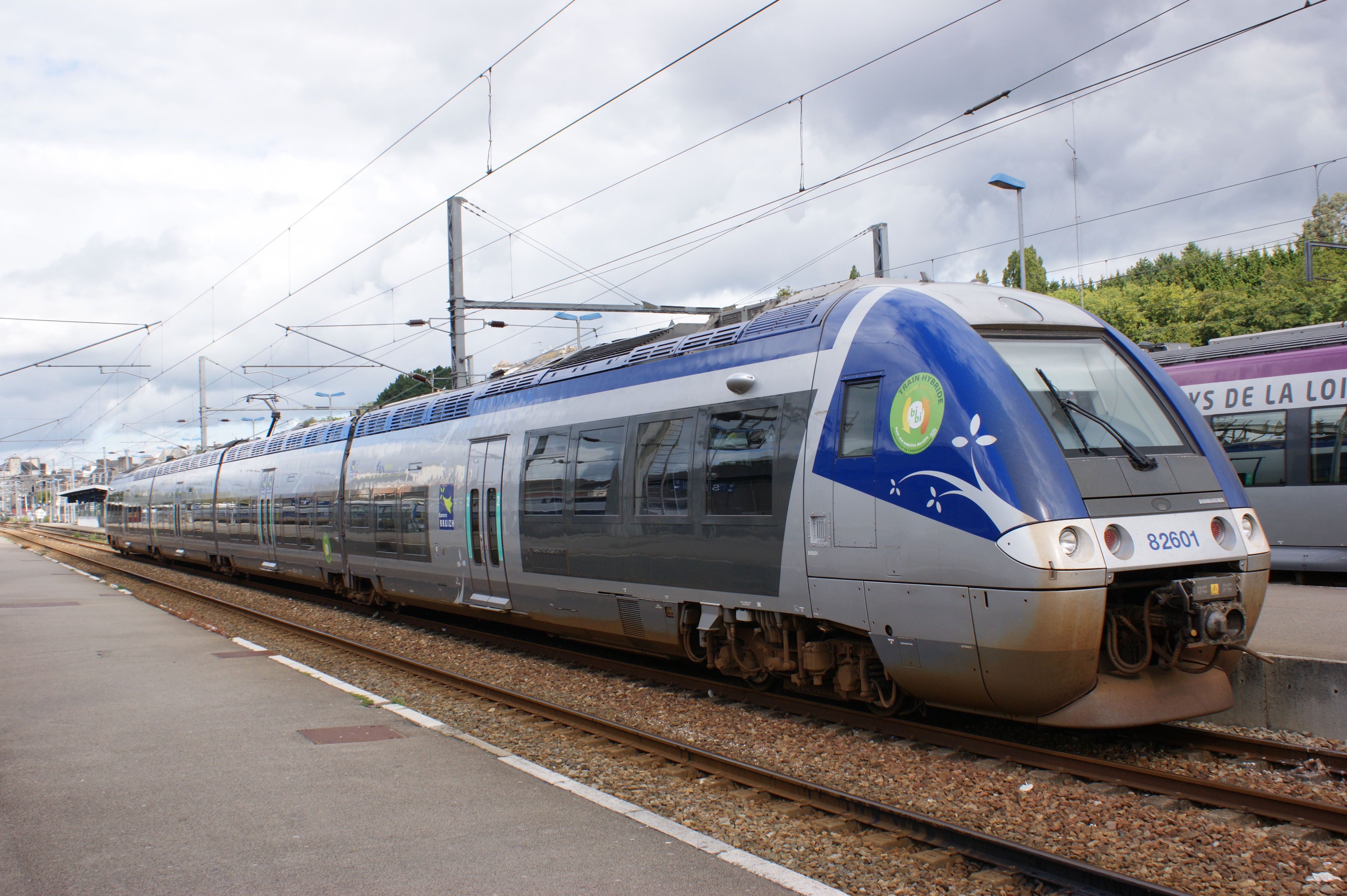 En gare de Quimper, l'automoteur B-82601 des TER Bretagne.